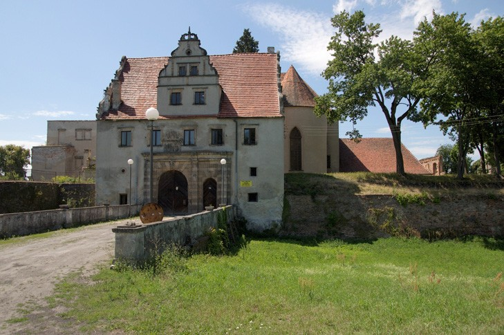 Siedlisko pałac Schönaichów